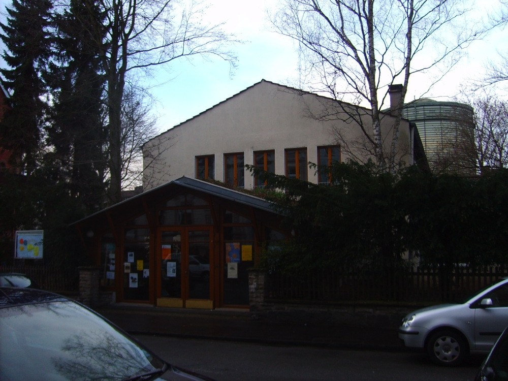 Paul-Gerhardt-Haus in Wuppertal-Heckinghausen auf dem Gelände der 1943 zerstörten Johannis-Kirche